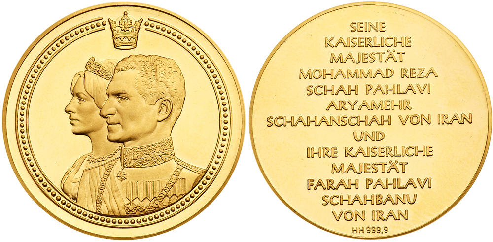 مدال طلای ۹۹۹/۹ عیار به وزن ۱۵/۷۰ گرم و قطر ۳۴ میلیمتر بمناسبت حضور محمدرضا و فرح پهلوی در آلمان غربی